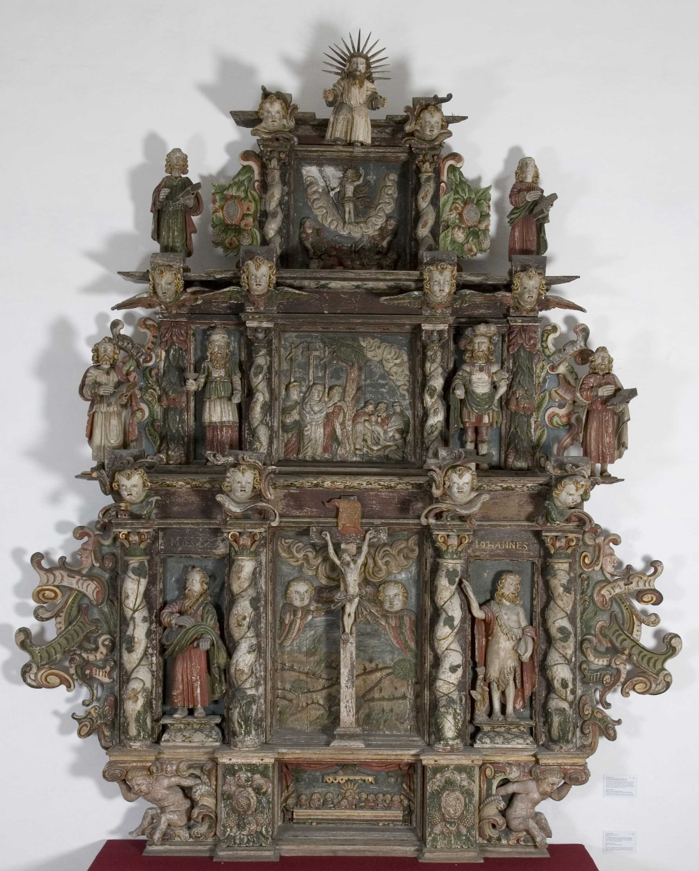 Altertavle fra Brevik kirke i Telemark. Den er datert 1668 og er antakelig skåret av bilthugger Christopher Ridder. Foto Anne-Lise Reinsfelt/Norsk Folkemuseum, NF.1909-0697.